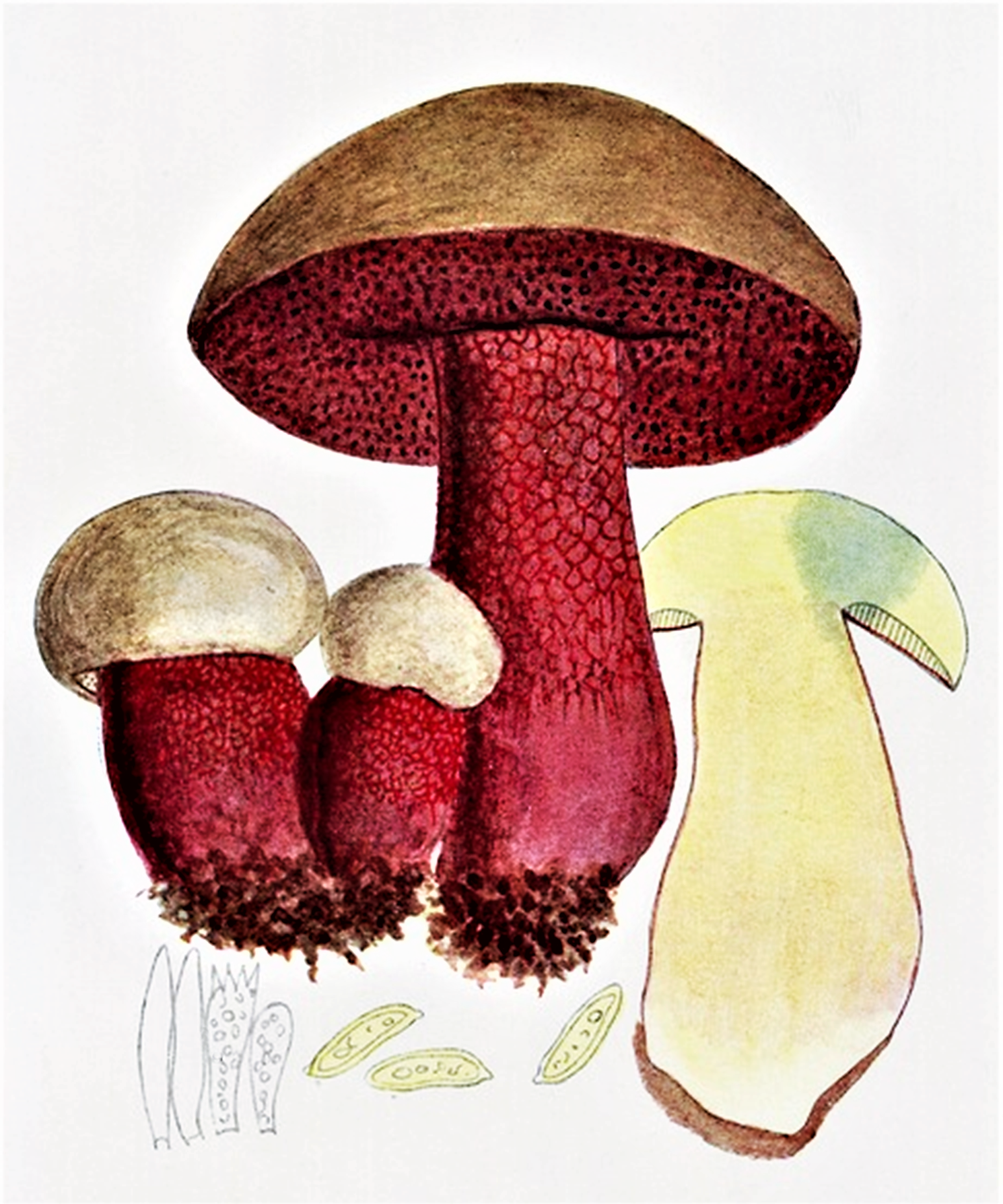 Giacomo Bresadola: Boletus lupinus Fr. (1838)